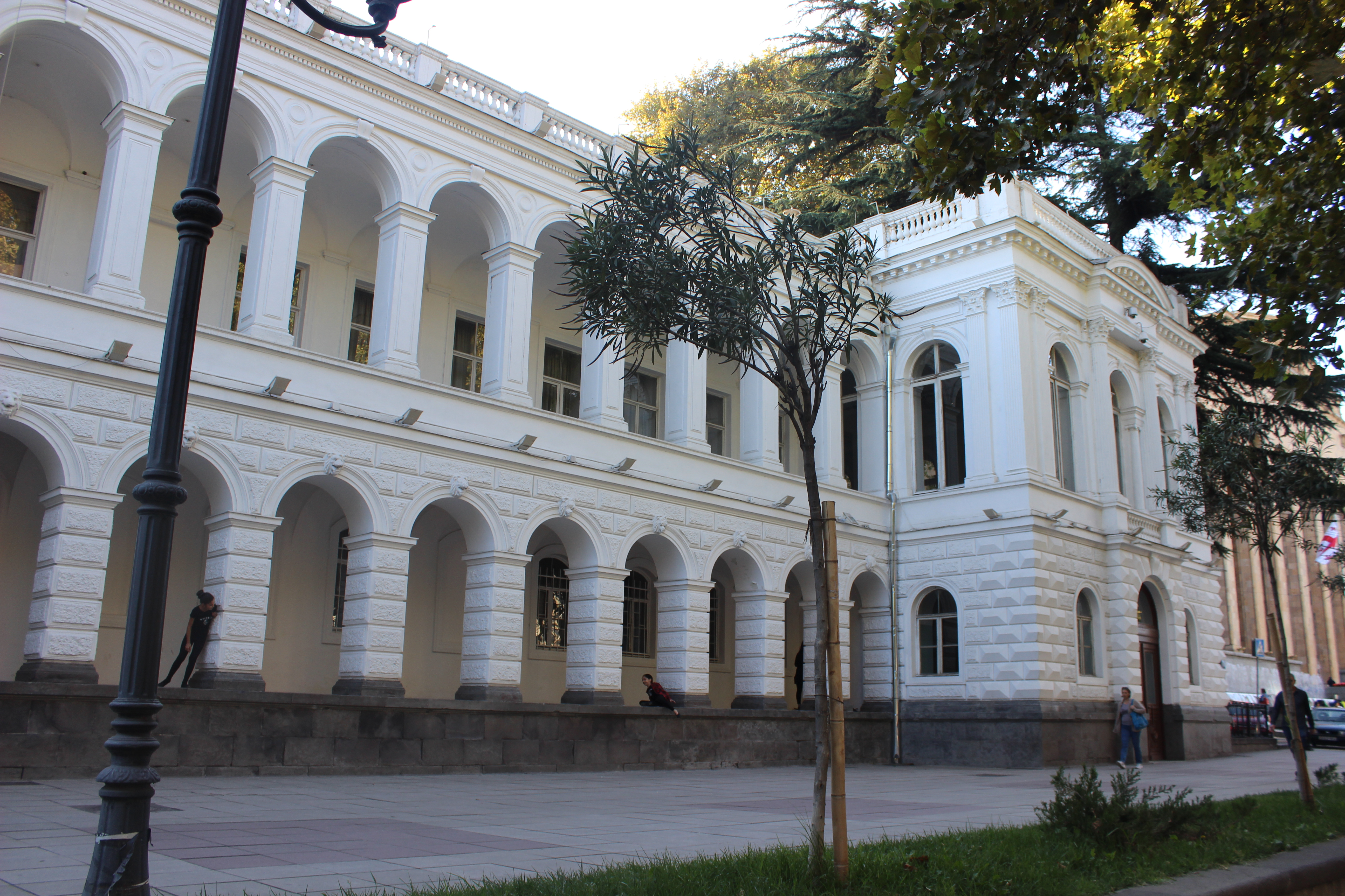 მოსწავლე-ახალგაზრდობის სასახლე